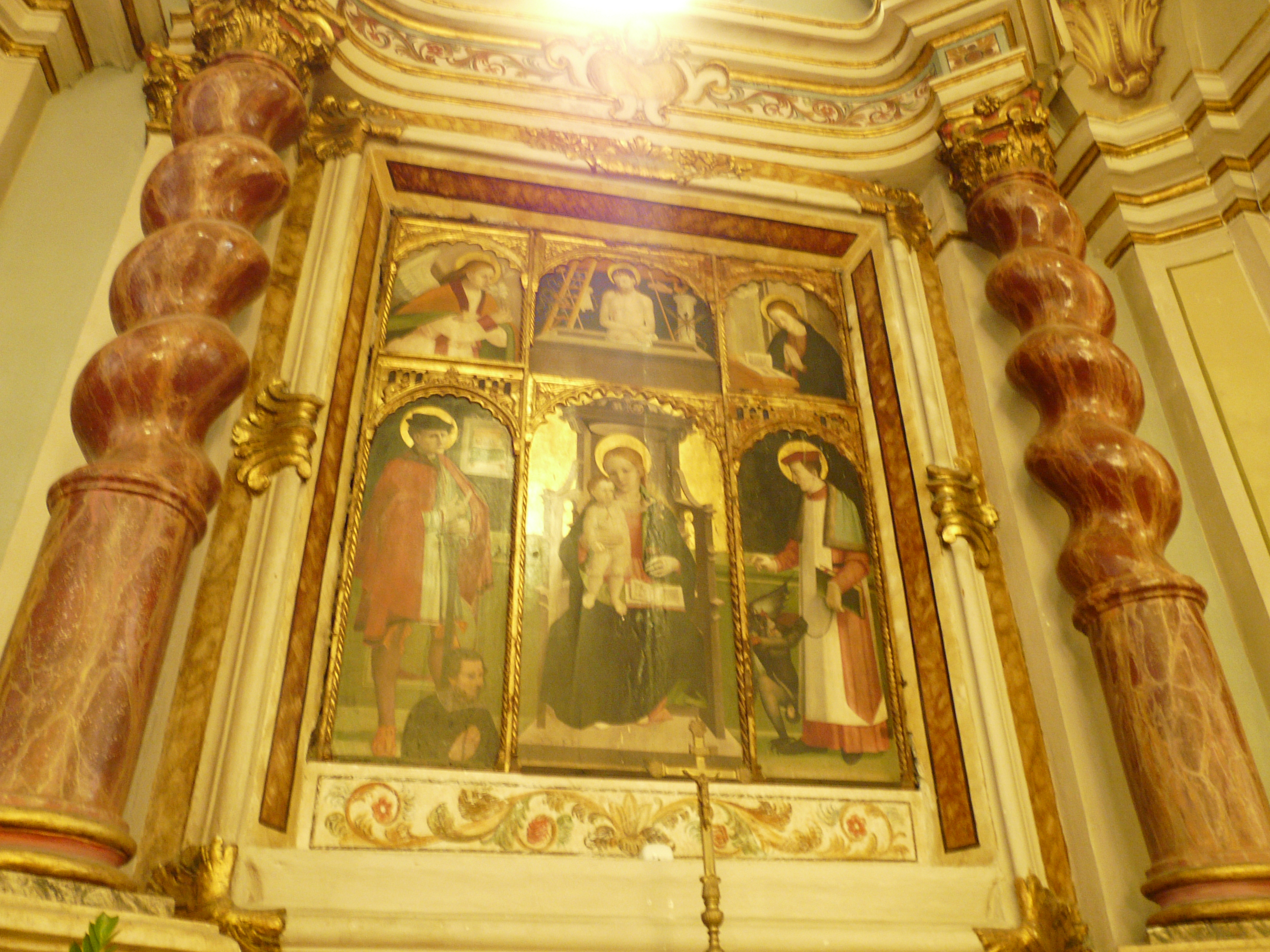 Chiesa di San Michele Arcangelo di Camporosso, Liguria, Italia